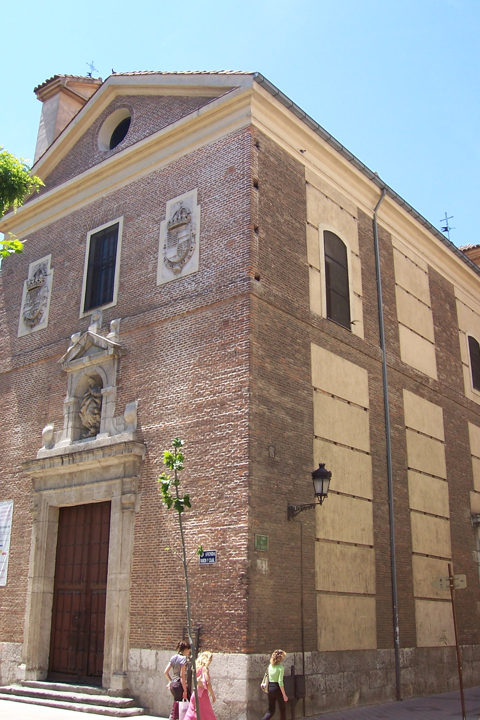 Convento de las Descalzas Reales de Valladolid. La iglesia, que hace esquina entre la calle de Ramón y Cajal y la de San Martín. Se ve la puerta clasicista de los pies, cuyo vano está rodeado por un marco de piedra con pilastras laterales y con dintel; en las esquinas se muestra la clásica decoración con bolas barrocas. Sobre la puerta se abre una hornacina en piedra, rematada por un frontón también adornado con bolas. En el hueco se ve la imagen en piedra de la Asunción (advocación del convento), obra atribuida a Gregorio Fernández.